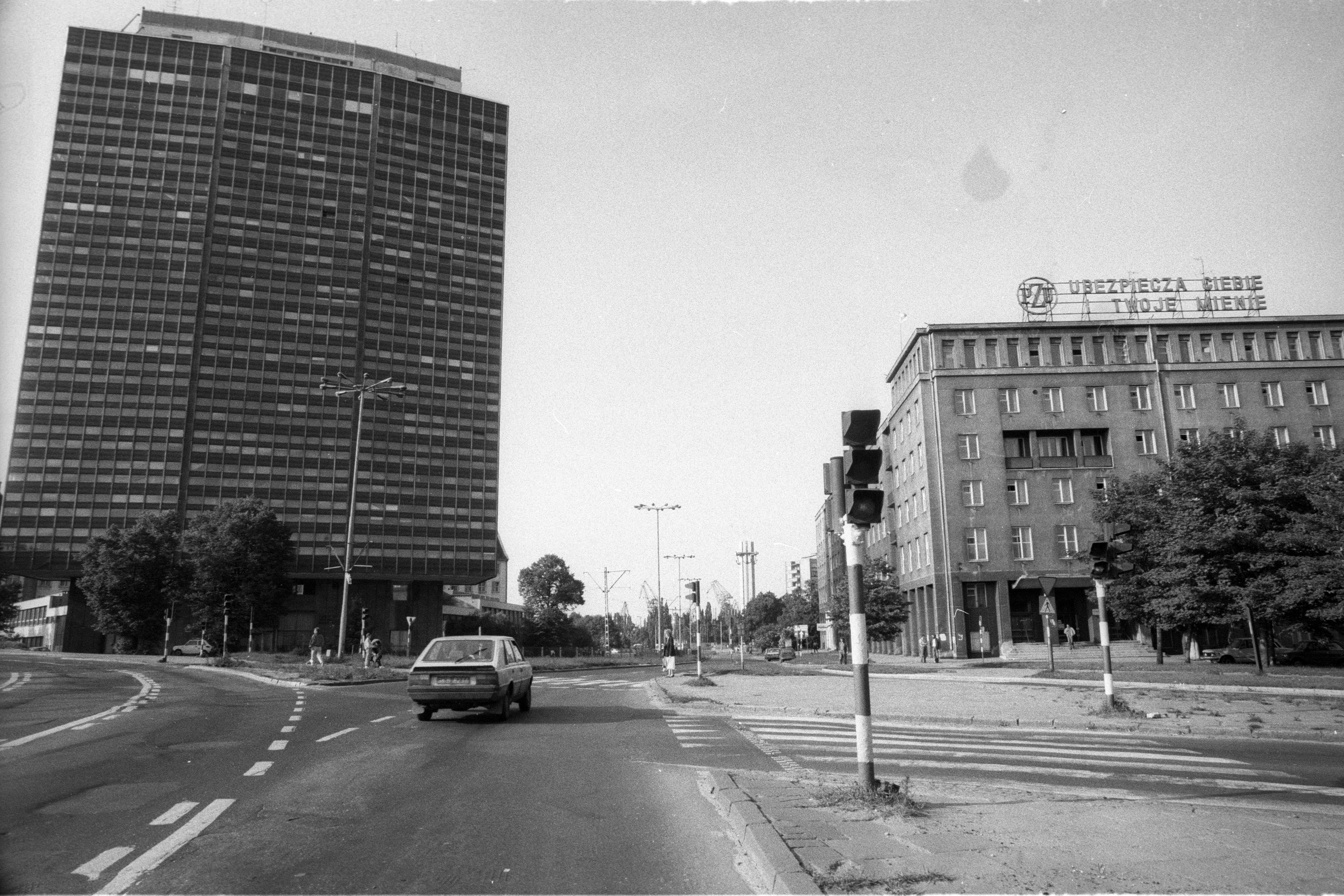 ulica Wały Piastowskie, jobbra az ulica Rajska torkolata. Location: Poland, Gdansk Tags: street view, high-rise building, intersection Title: ulica Wały Piastowskie, jobbra az ulica Rajska torkolata.